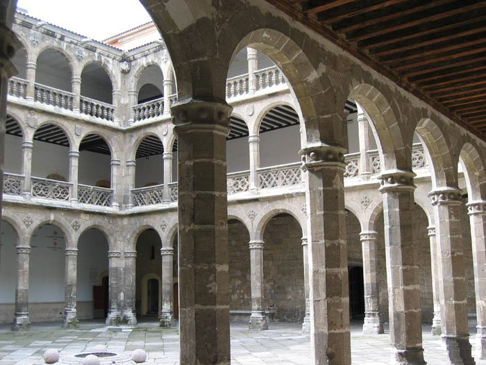 Valladolid – España (Spain) - Palacio de Santa Cruz: Claustro Interior